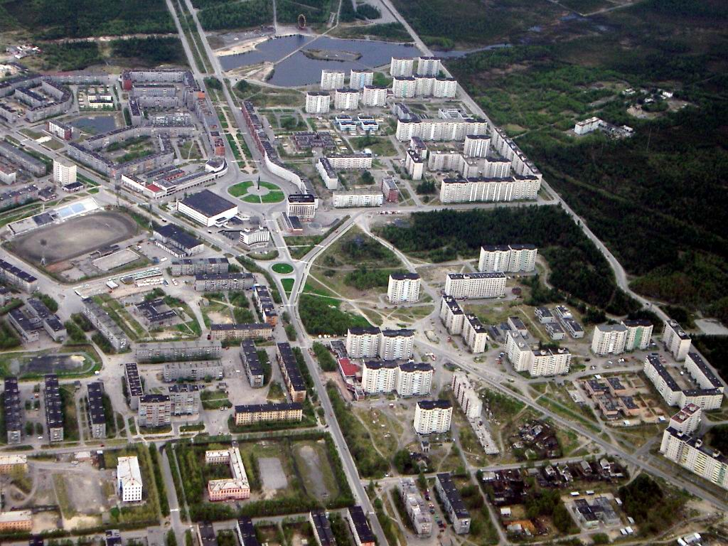 Оленегорск с высоты птичьего полета